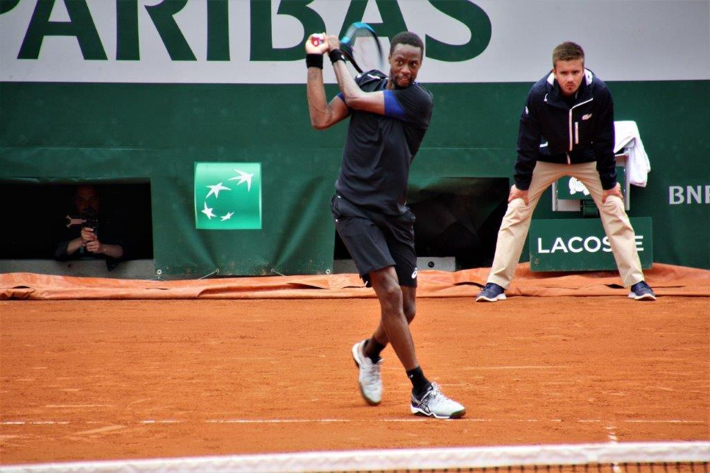 Gael Monfils 10 Juin 2018 en 8ème de finale contre David Goffin